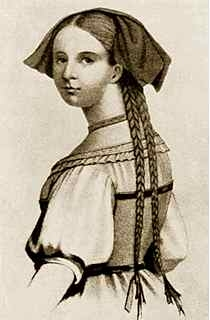 Friederike Brion